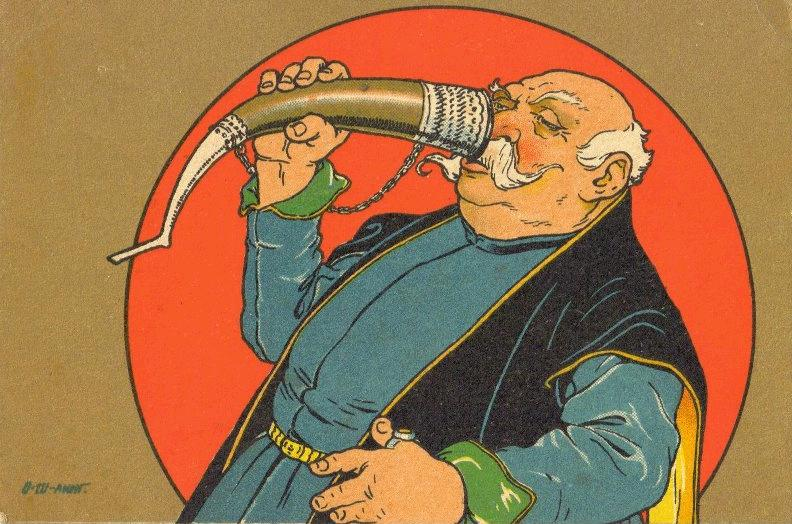 "თქვენი სადღერგძელო იყოს"